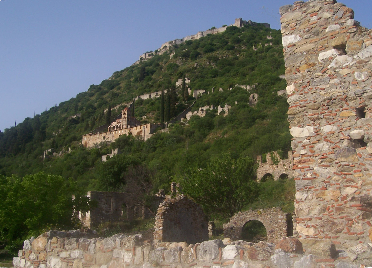 le site de mistra (Grèce)